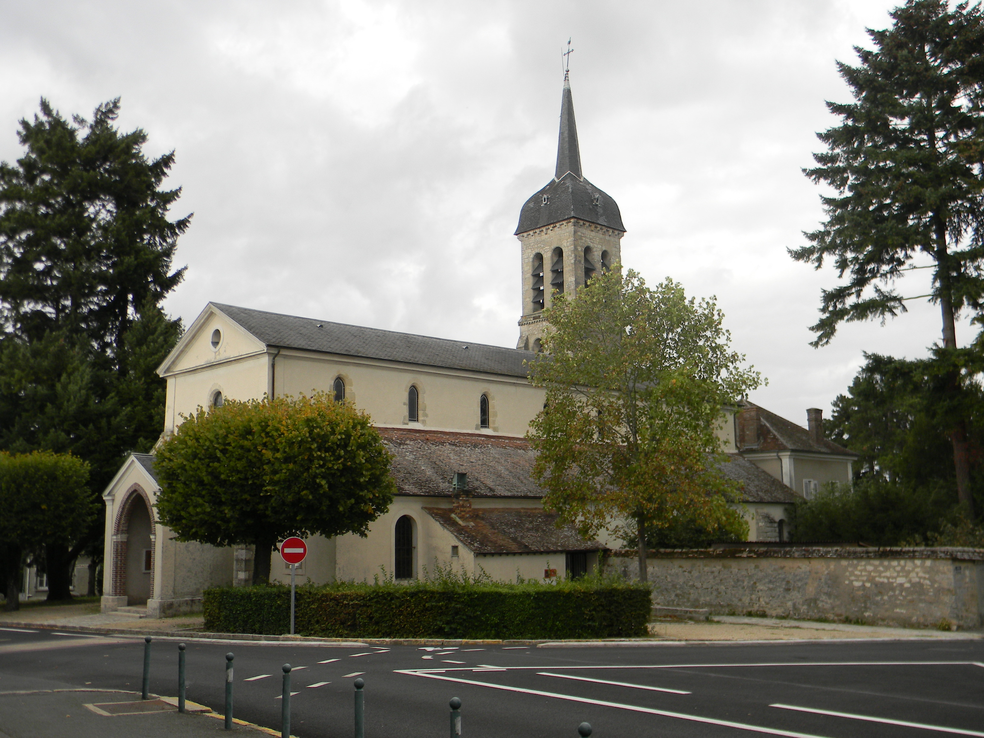 Église Saint-Pierre de Bois-le-Roi (77590) (XIIe et XIXe siècles).